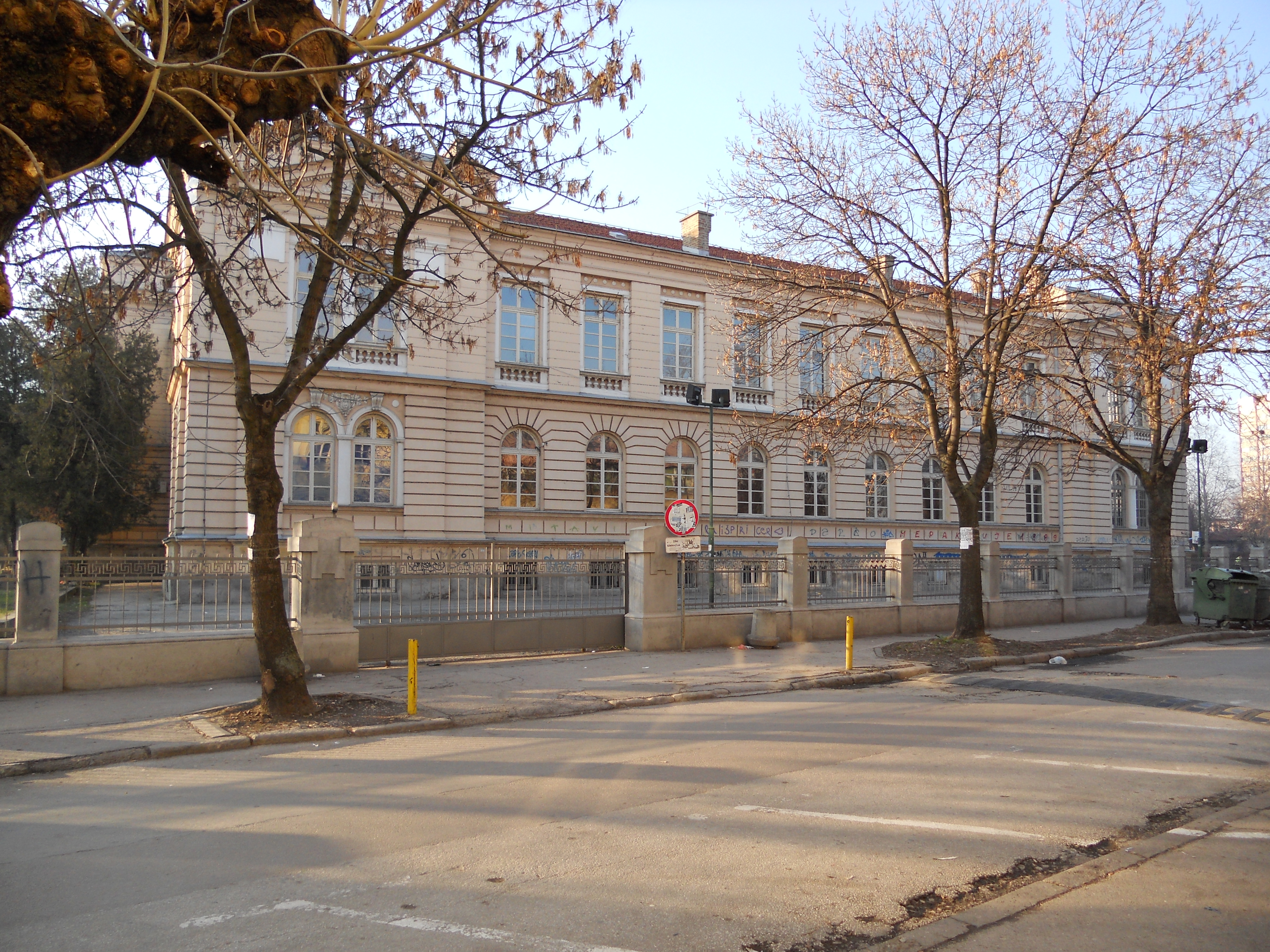 Srpski (latinica): Gimnazija Stevan Sremac u Nišu.